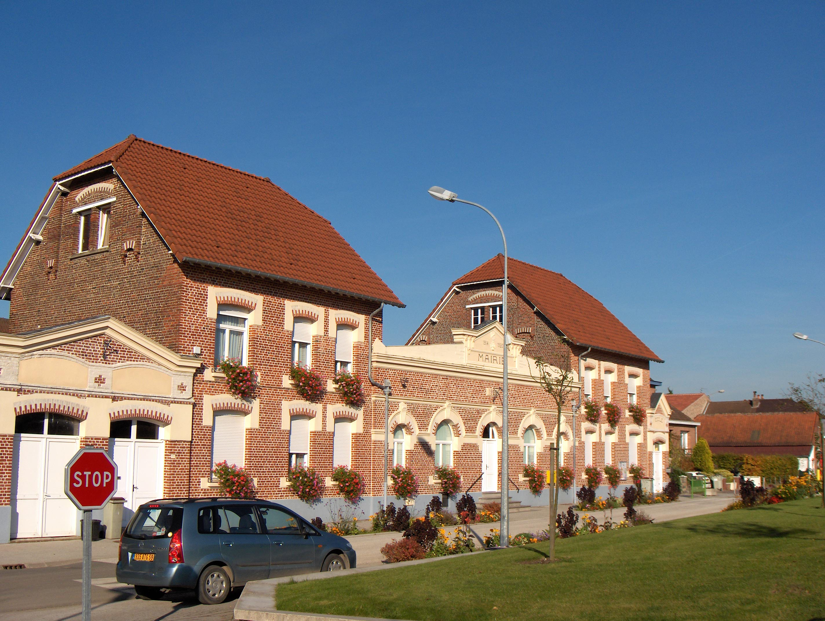 Radinghem-en-Weppes (France, dept. Nord), mairie